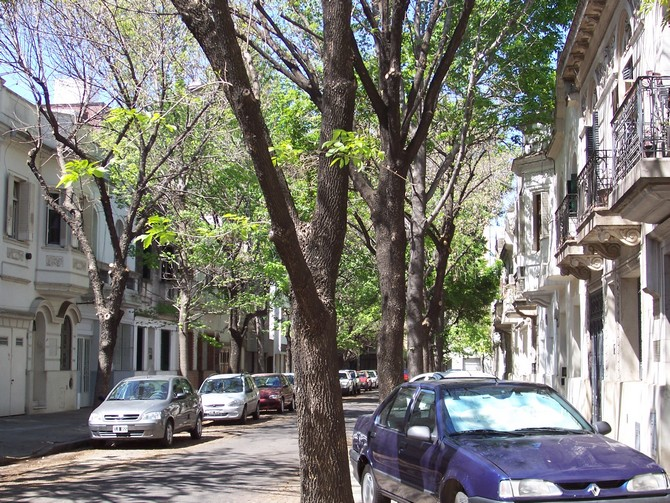 Pasaje Monroe en Rosario, Argentina, con muestras de arquitectura Art Déco